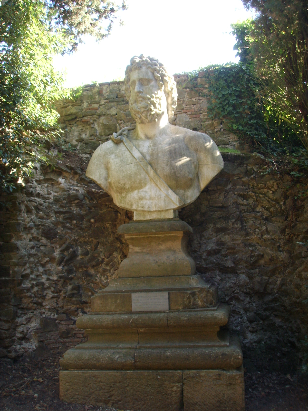 Boboli, giambologna, busto di giove olimpico, 1560 circa